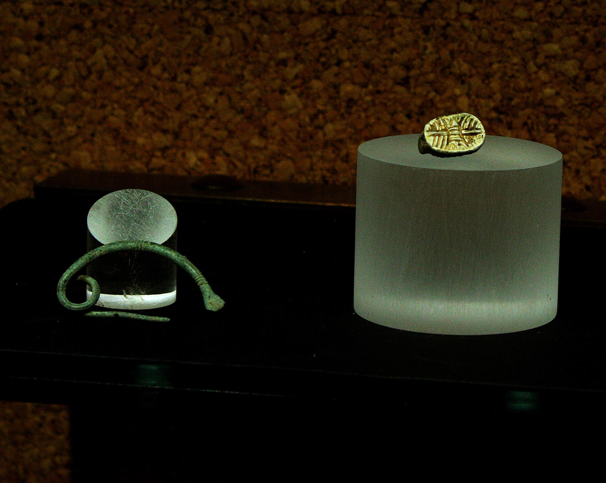 Scarabeo e fibula dalla tomba n. 25 di Monte Prama